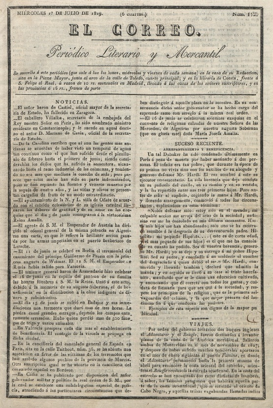 Correo Literario y Mercantil de 1829 Título: El Correo (Madrid) Fecha: 01/07/1829 Tipo de Documento: Prensa y Revistas